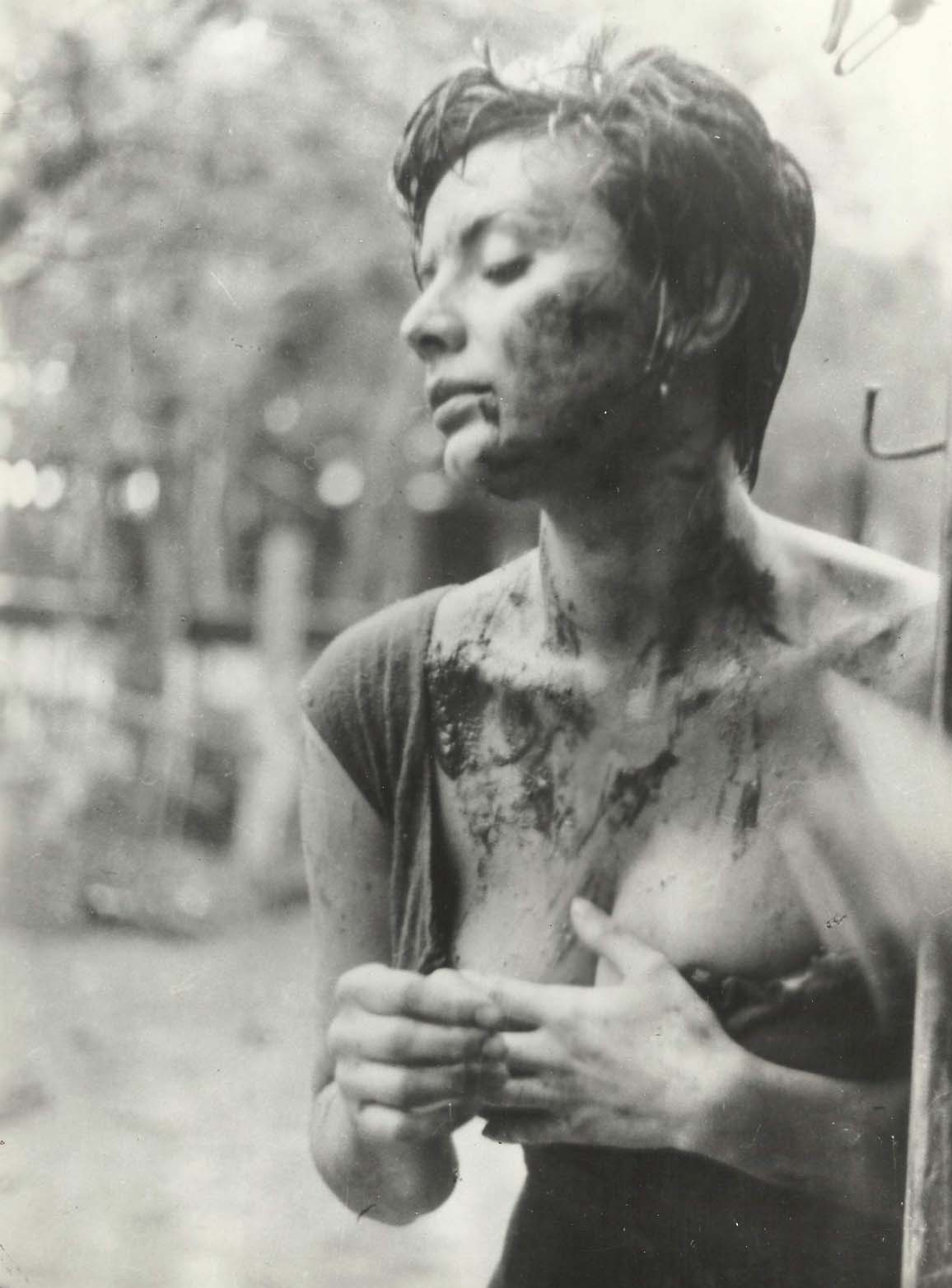 Isabel Sarli en Sabaleros, película de 1958.